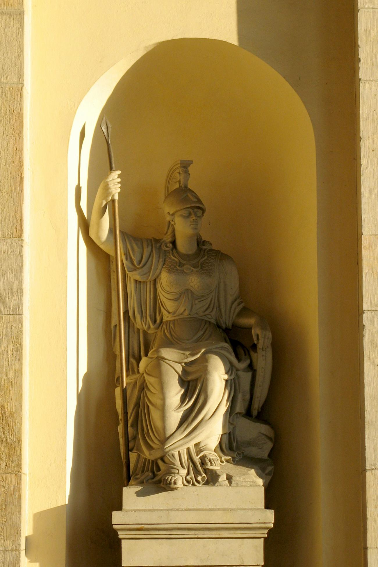 Statue der römischen Göttin Minerva am Brandenburger Tor in Berlin. Entwurf: Johann Gottfried Schadow, ausgeführt von Karl Friedrich Wichmann (1775 - 1836). Minerva ist eine Kopie (1951) des kriegszerstörten Originals [1]